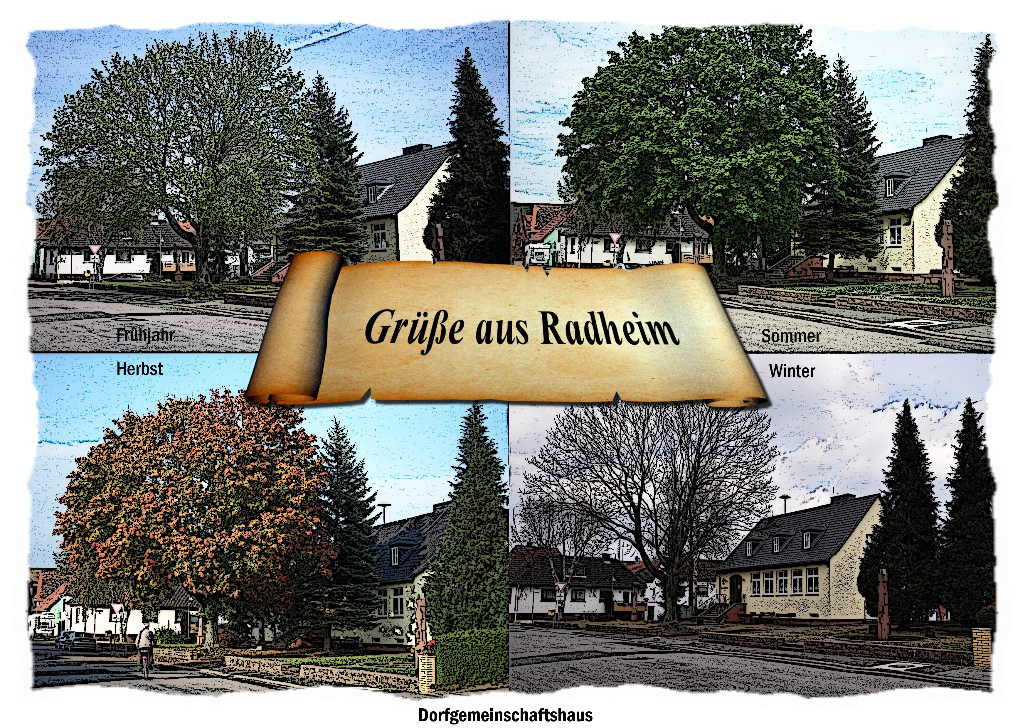 Postkarte Radheim